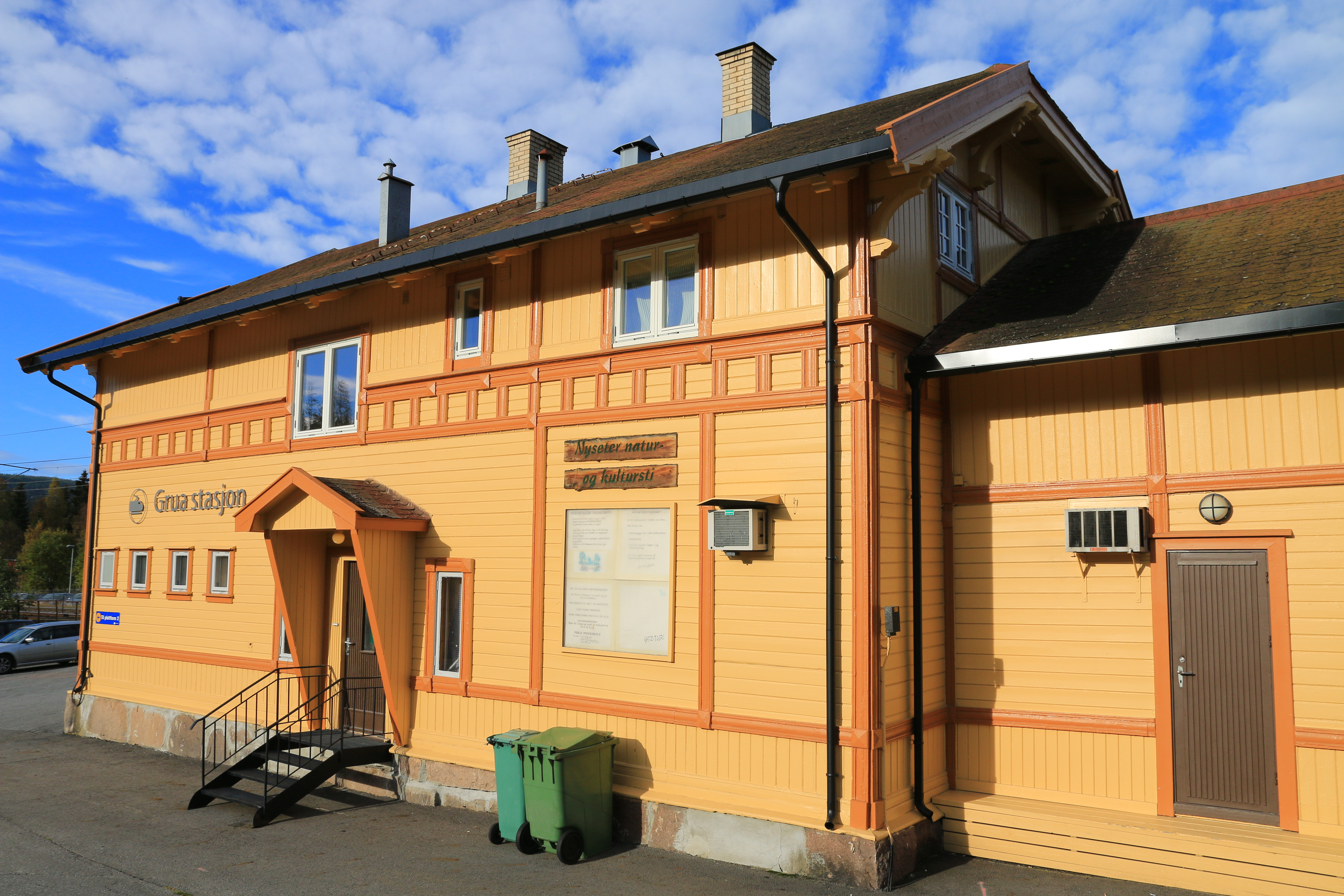 Grua stasjon.